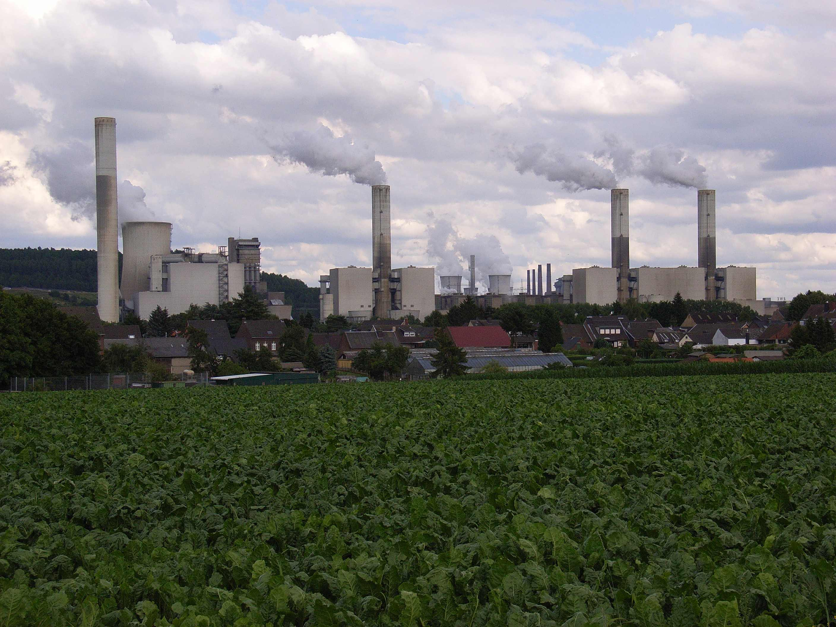 RWE Braunkohlekraftwerk Frimmersodrf